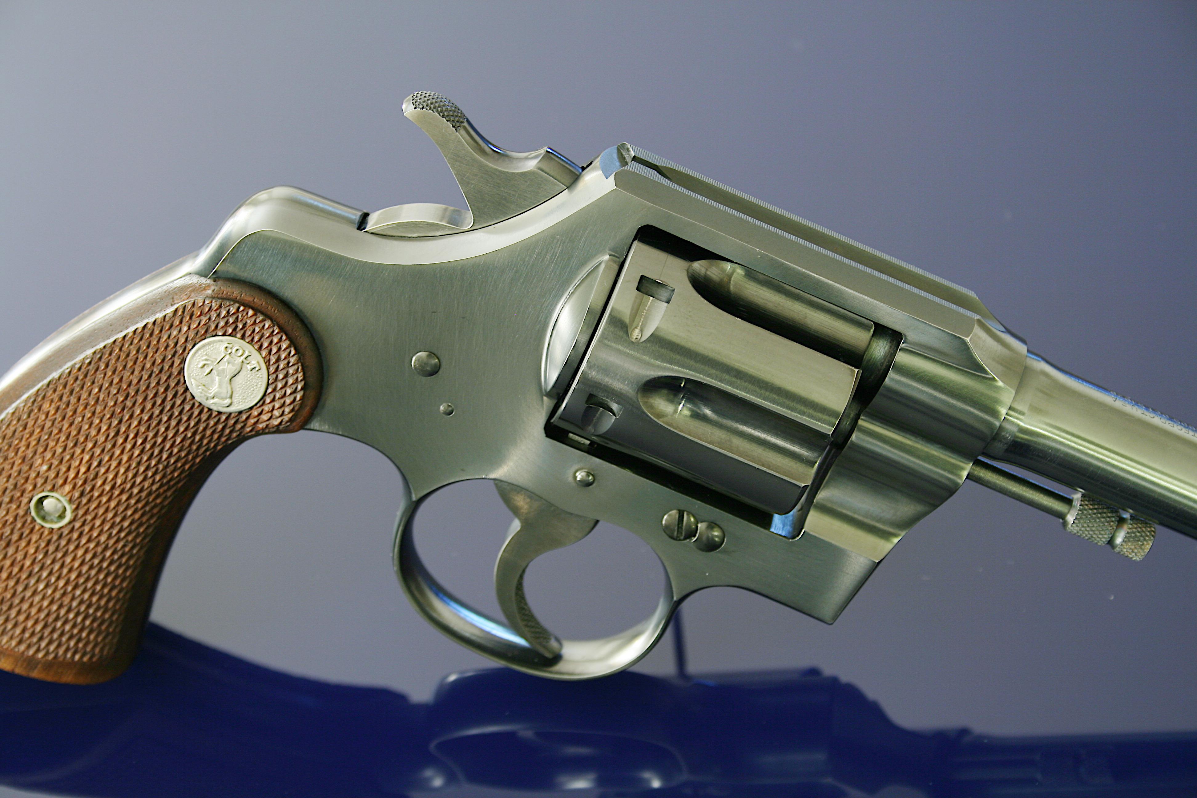 Colt Official Police .22lr circa 1938